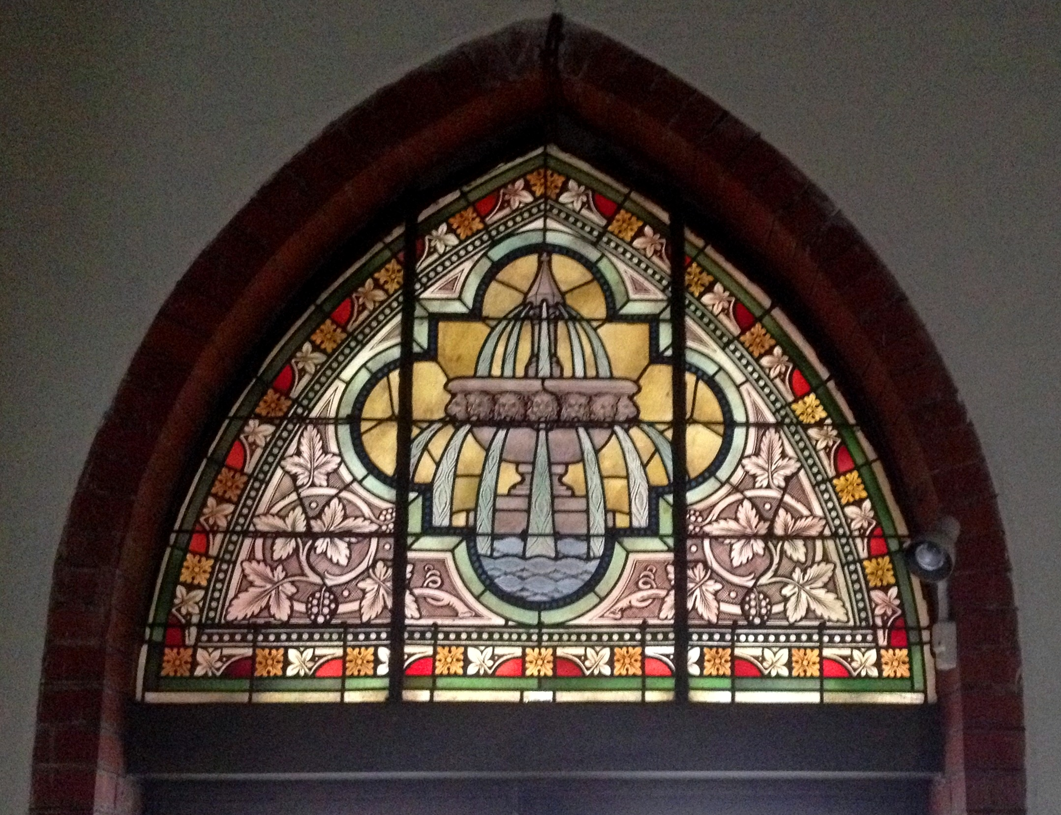 Bündheim, St. Gregor VII., Bildfenster über dem Eingang, Illustration zu Psalm 36,9f: Sie laben sich am Reichtum deines Hauses; du tränkst sie mit dem Strom deiner Wonnen. Denn bei dir ist die Quelle des Lebens.